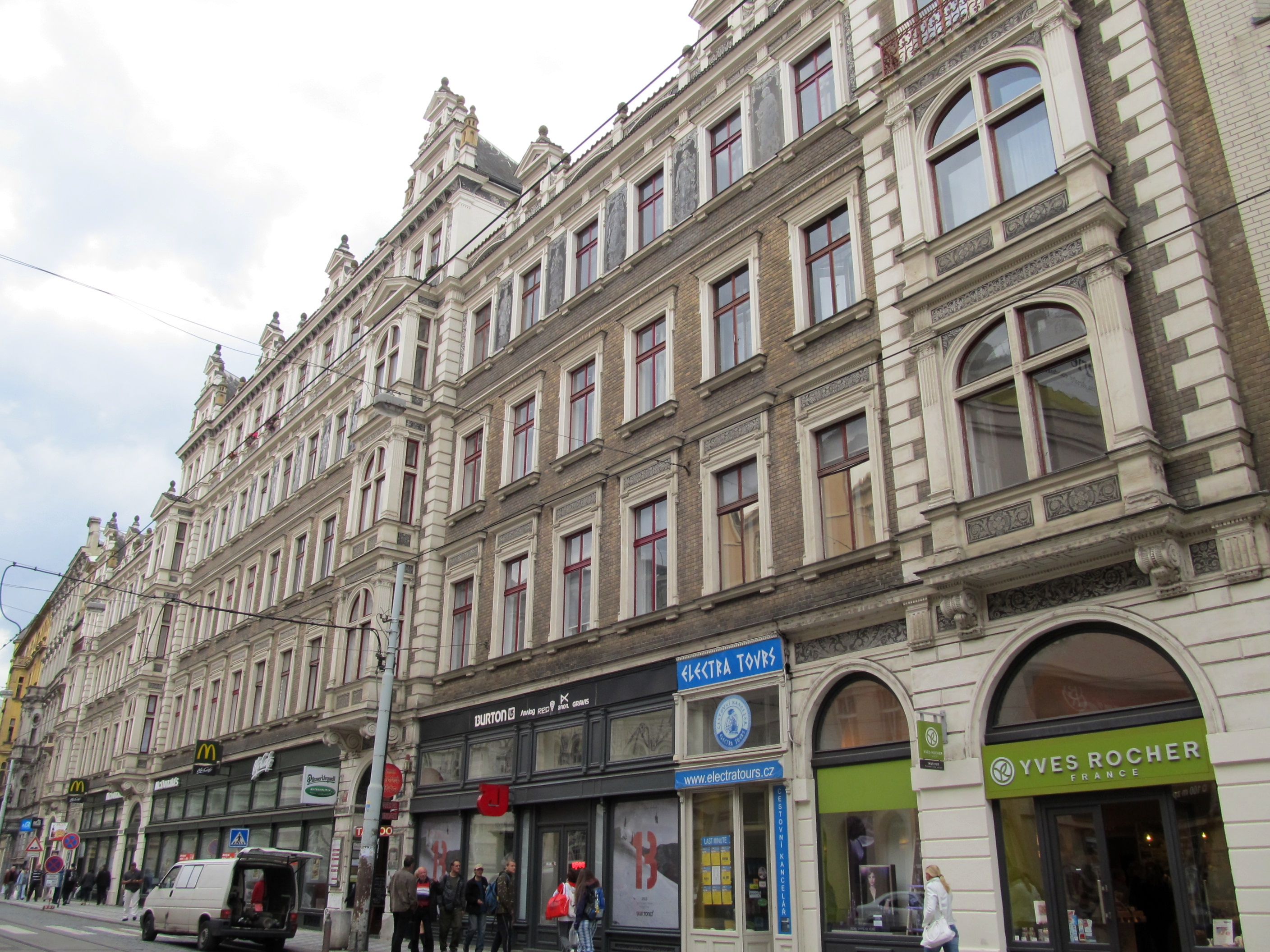 Činžovní dům - Hlávkovy domy (Nové Město), Praha 1, Jungmannova (Vodičkova 15 - 17) 736/10, Nové Město